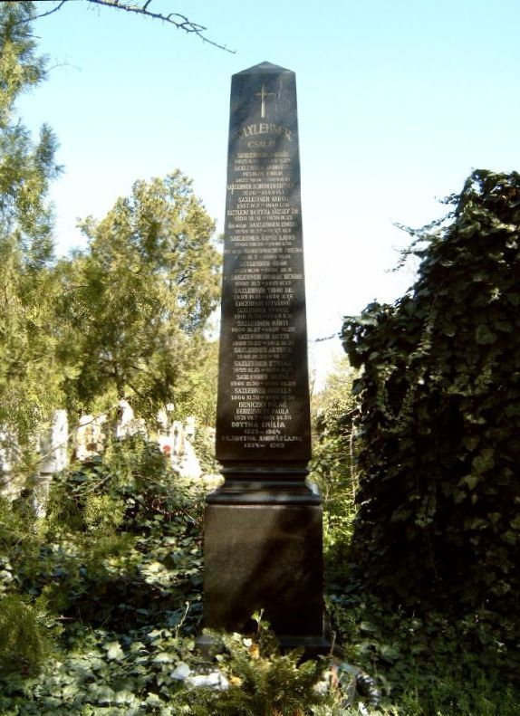 Saxlehner András (Kőszeg, 1815, febr. 19. – Bp., 1889. máj. 24.): a Buda környéki keserűvíz-források felfedezője és első tulajdonosa, eredetileg posztókereskedő sírja Budapesten. Új köztemető: 16/1-1-35/36.